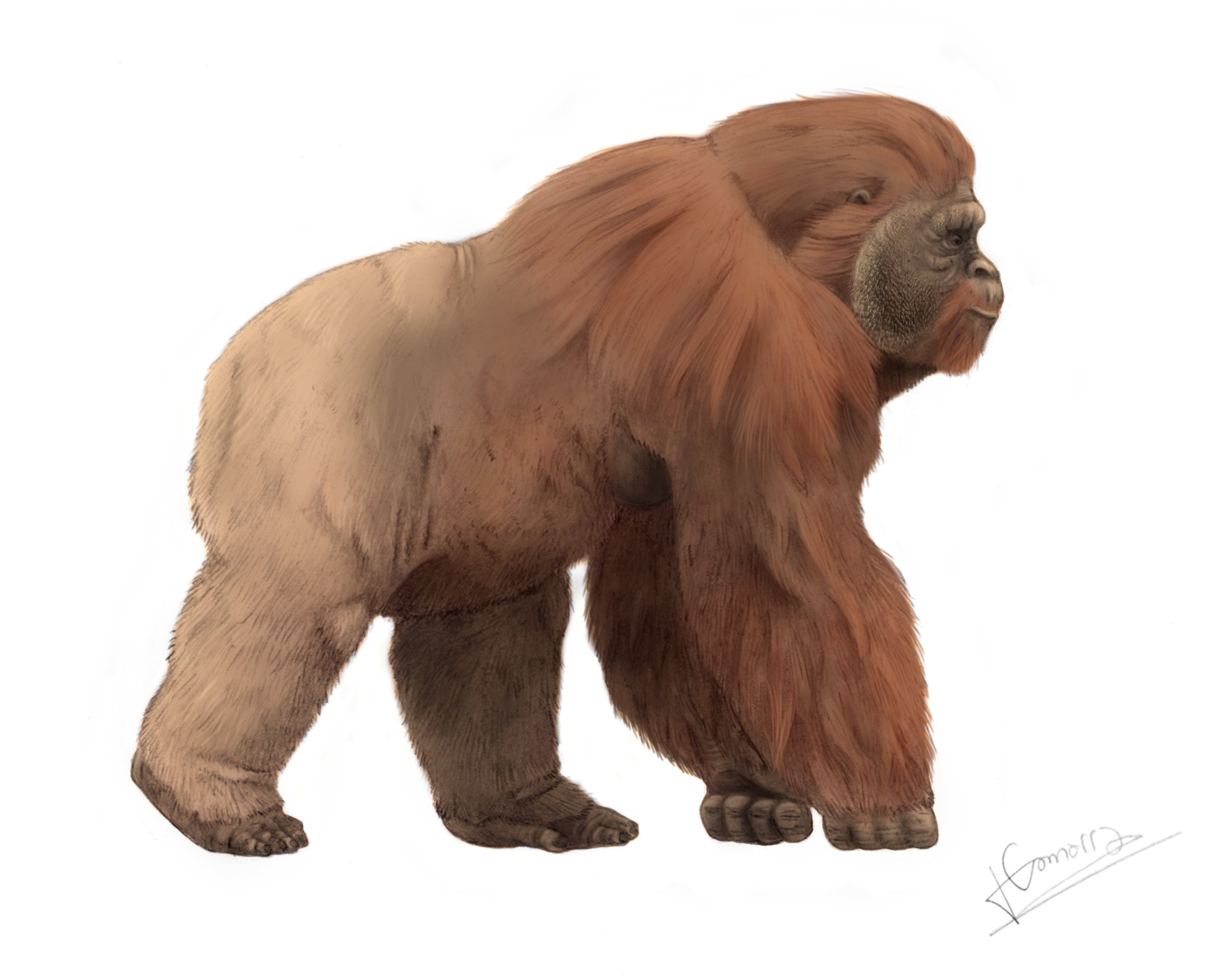 Representación ideal del Gigantopithecus blackii